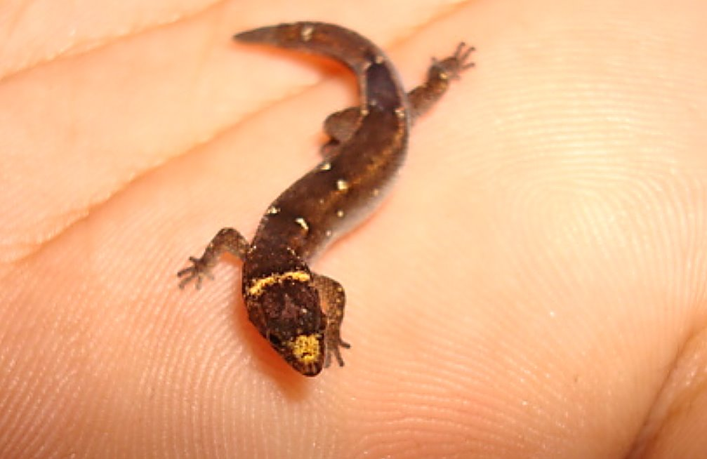 Foto frontal do Lagartinho-de-Folhiço Coleodactylus natalensis.